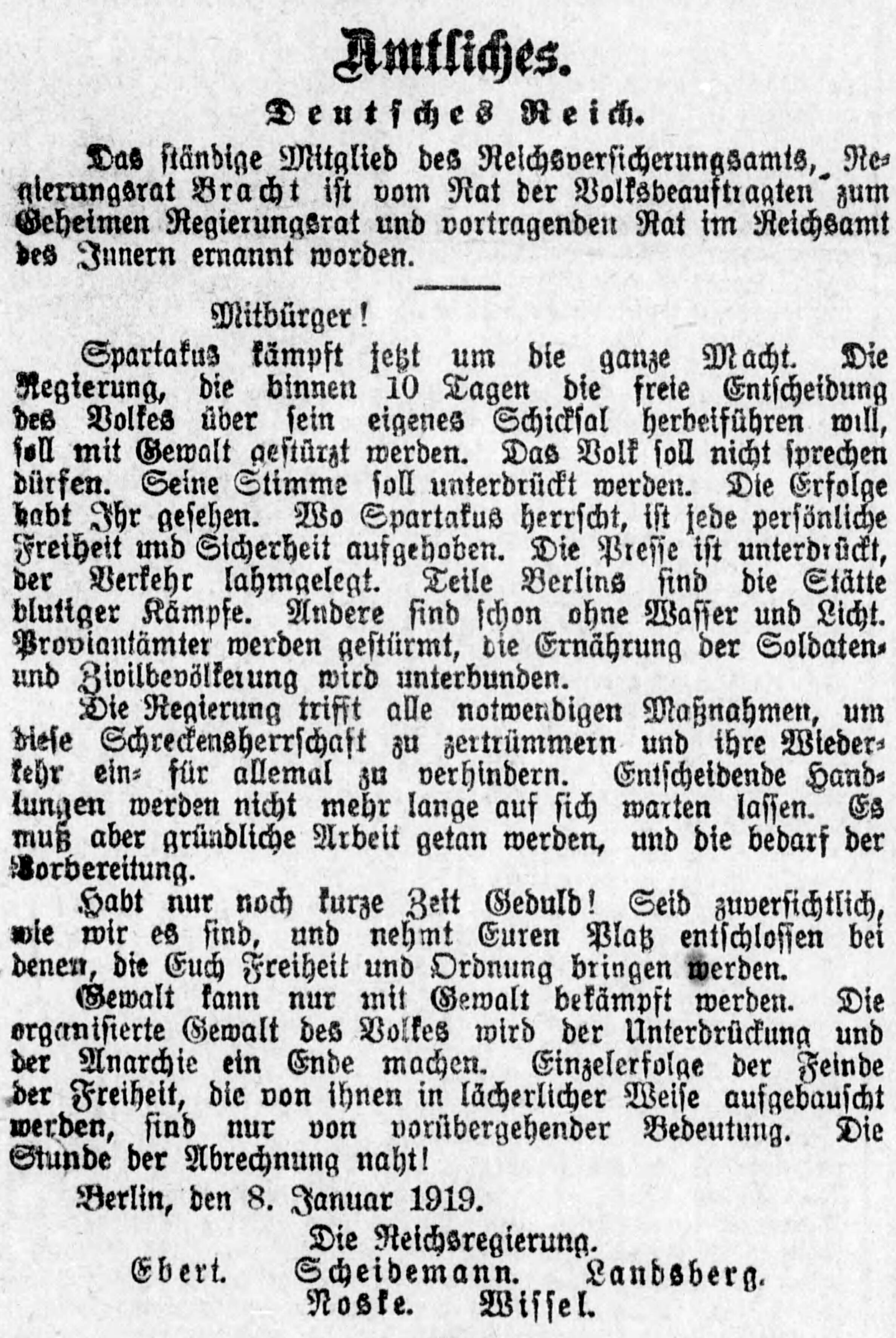 Aufruf der Reichsregierung zum Kampf gegen Spartakus vom 8. Januar 1919